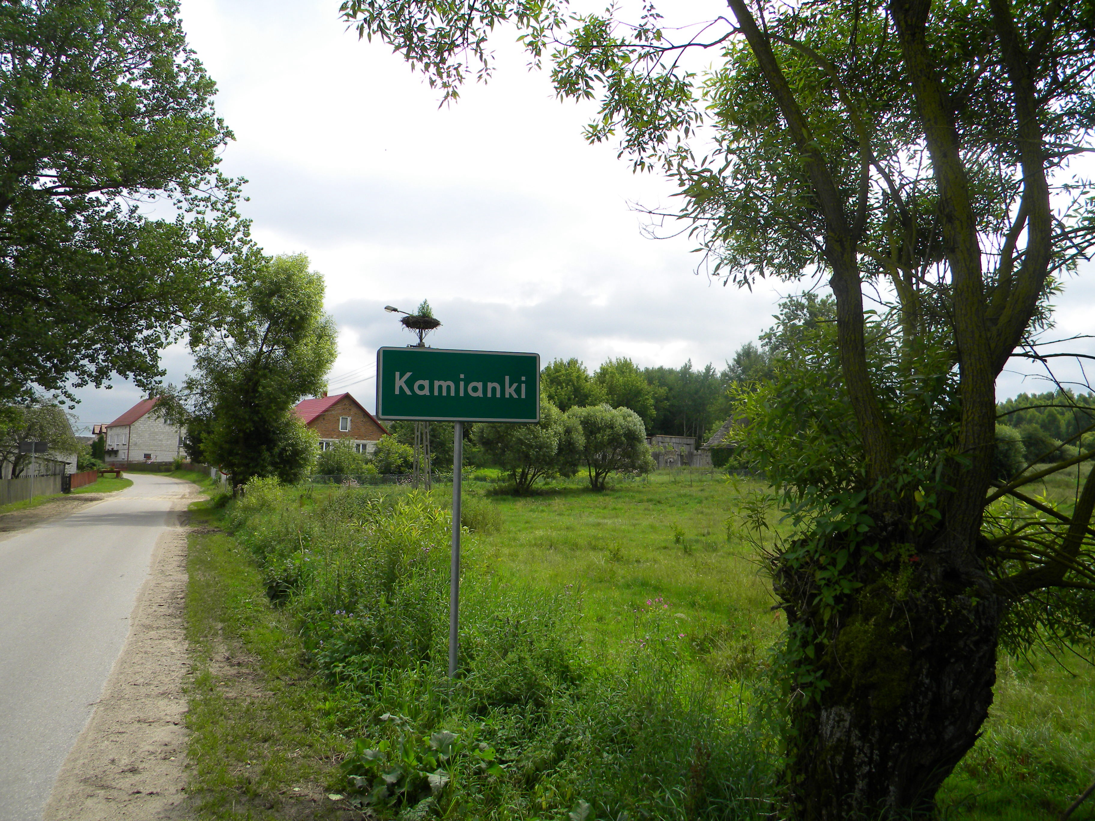 Kamianki, kierunek Jedwabne - Burzyn